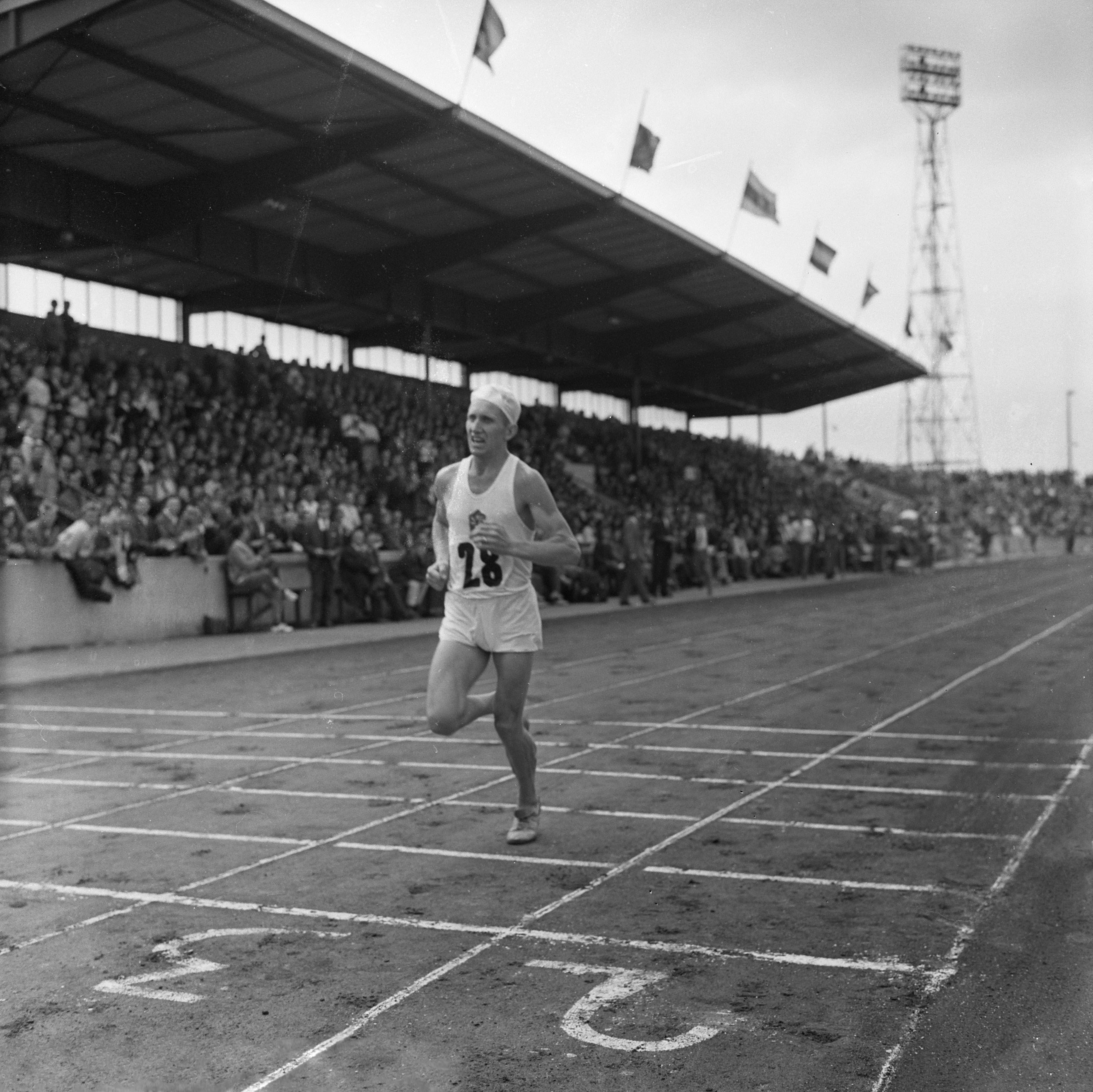 Collectie / Archief : Fotocollectie Anefo Reportage / Serie : Zes Landen Atletiek in Enschede Beschrijving : De Tsjech Varlav Chudomel als eerste over de finish van de marathon Datum : 13 juli 1963 Locatie : Enschede Trefwoorden : atletiek, sport Persoonsnaam : Chudomel, Vavlac Instellingsnaam : Zes Landen Athletiek Fotograaf : Koch, Eric / Anefo, [onbekend] Auteursrechthebbende : Nationaal Archief Materiaalsoort : Negatief (zwart/wit) Nummer archiefinventaris : bekijk toegang 2.24.01.03 Bestanddeelnummer : 915-3548